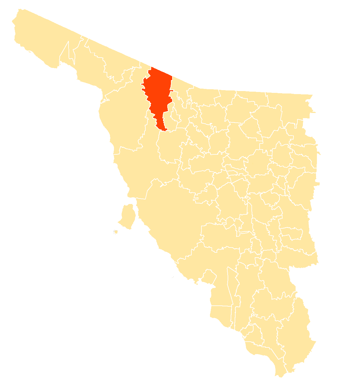 Municipio dentro de Sonora, México.